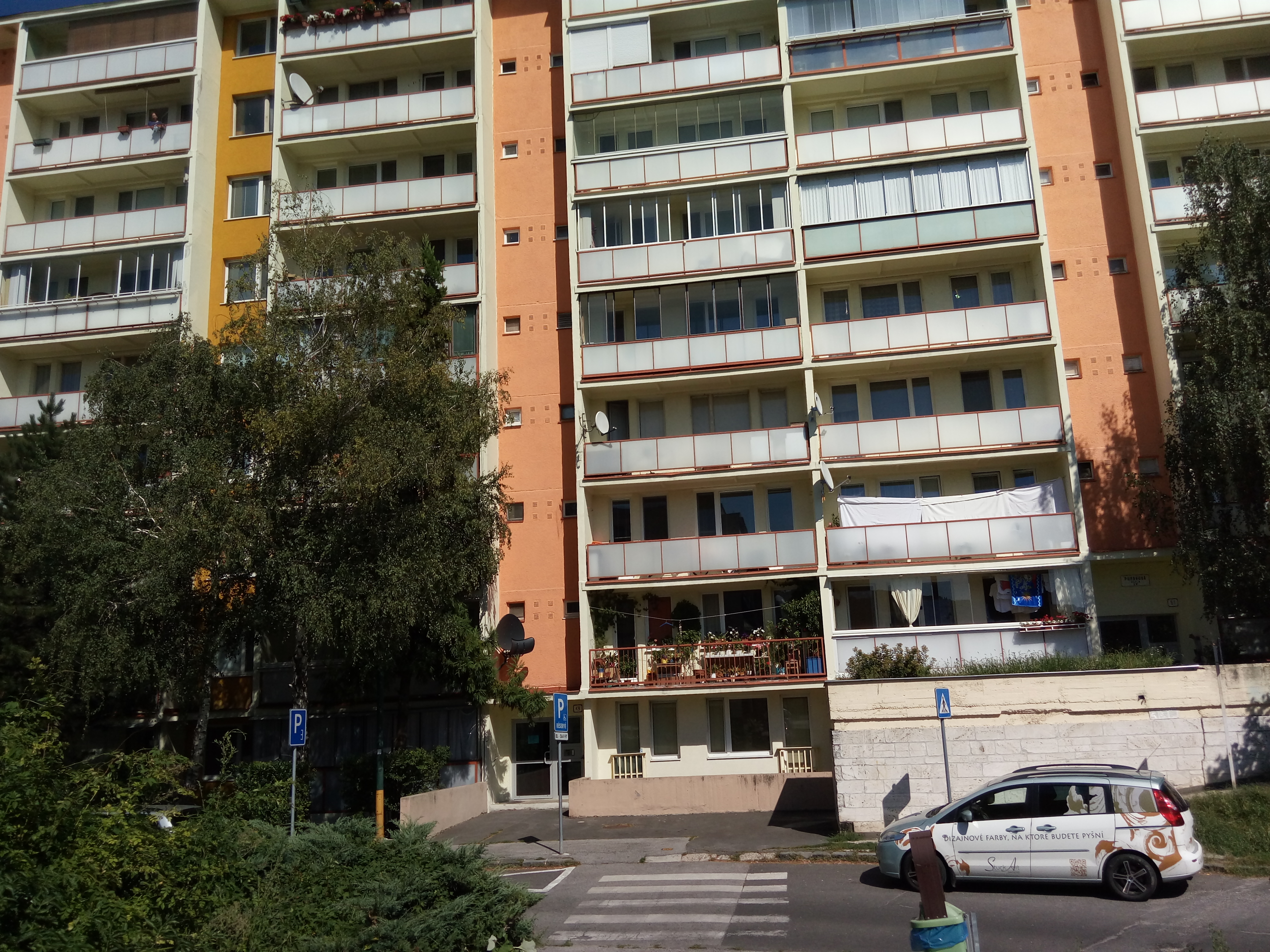 Púpavová 49, Karlova Ves, Bratislava